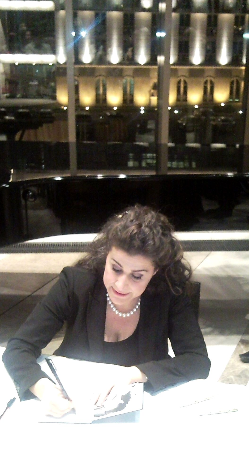 Cecilia Bartoli dedikál a Művészetek Palotájában (Budapest)